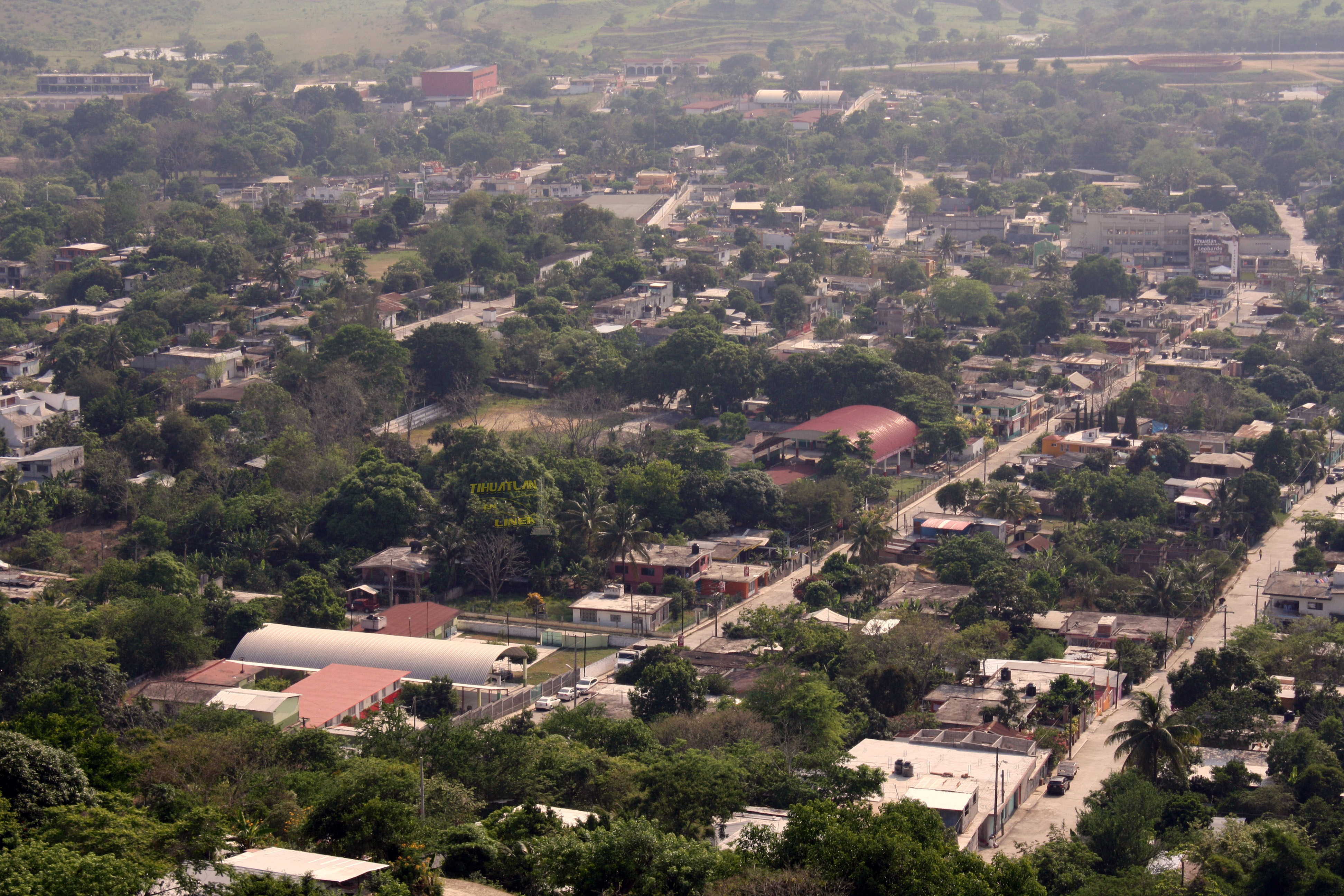 Panoramica desde el Cristo Redentor, al fondo libramiento hacia Alamo Veracruz